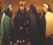 wamadat10